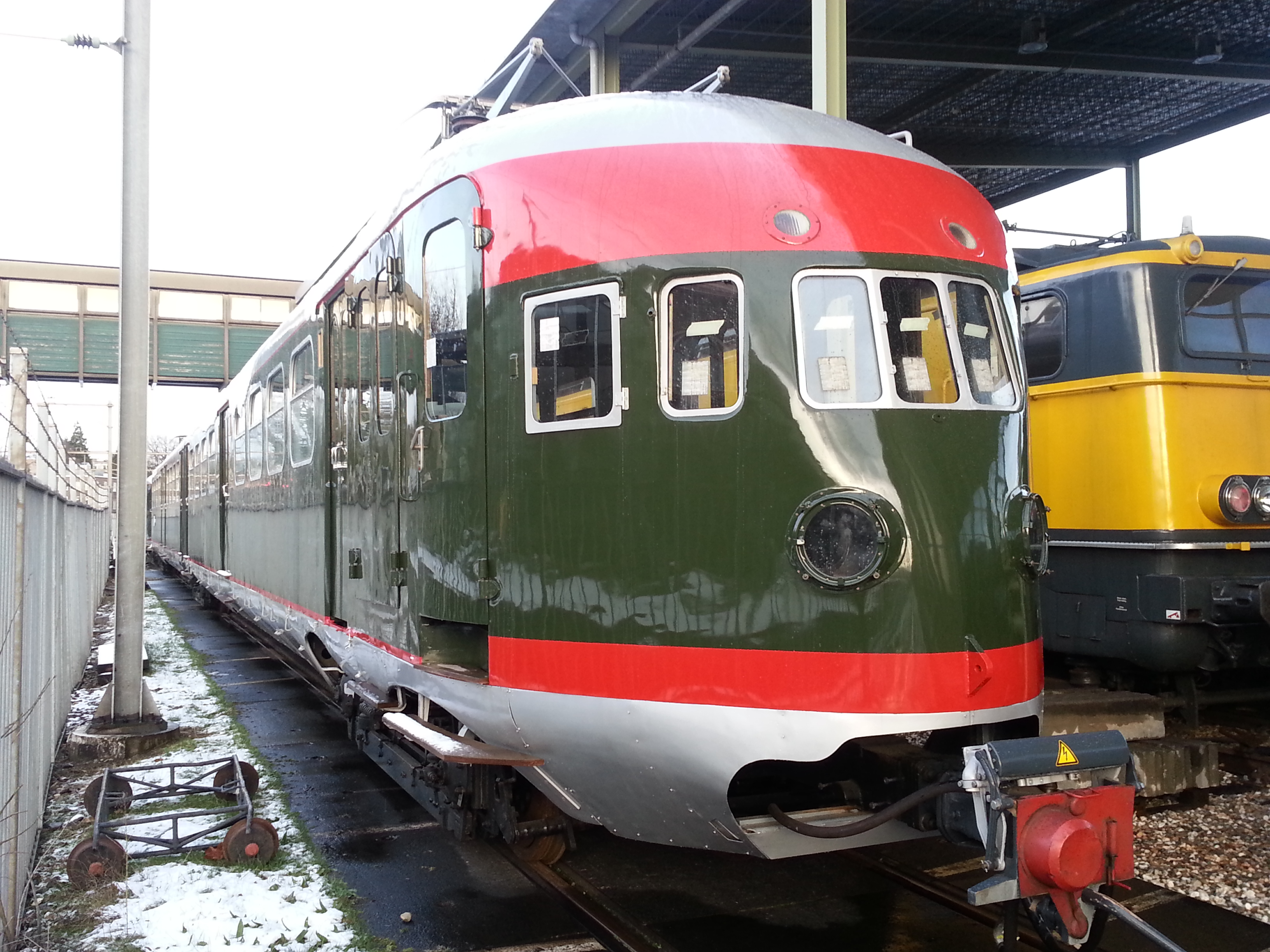 Treinstel 252 van het Nederlands Spoorwegmuseum in Utrecht na de renovatie in Duitsland